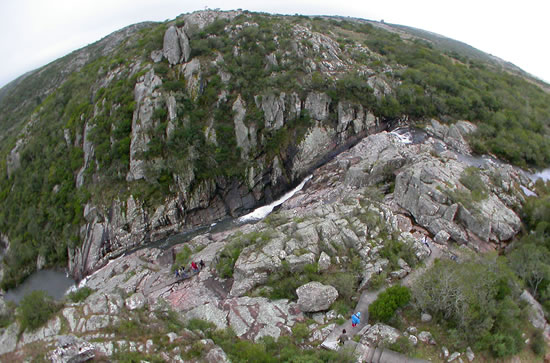 Imagen del Salto del Penitente. Lavalleja Uruguay Author: Fernando da Rosa